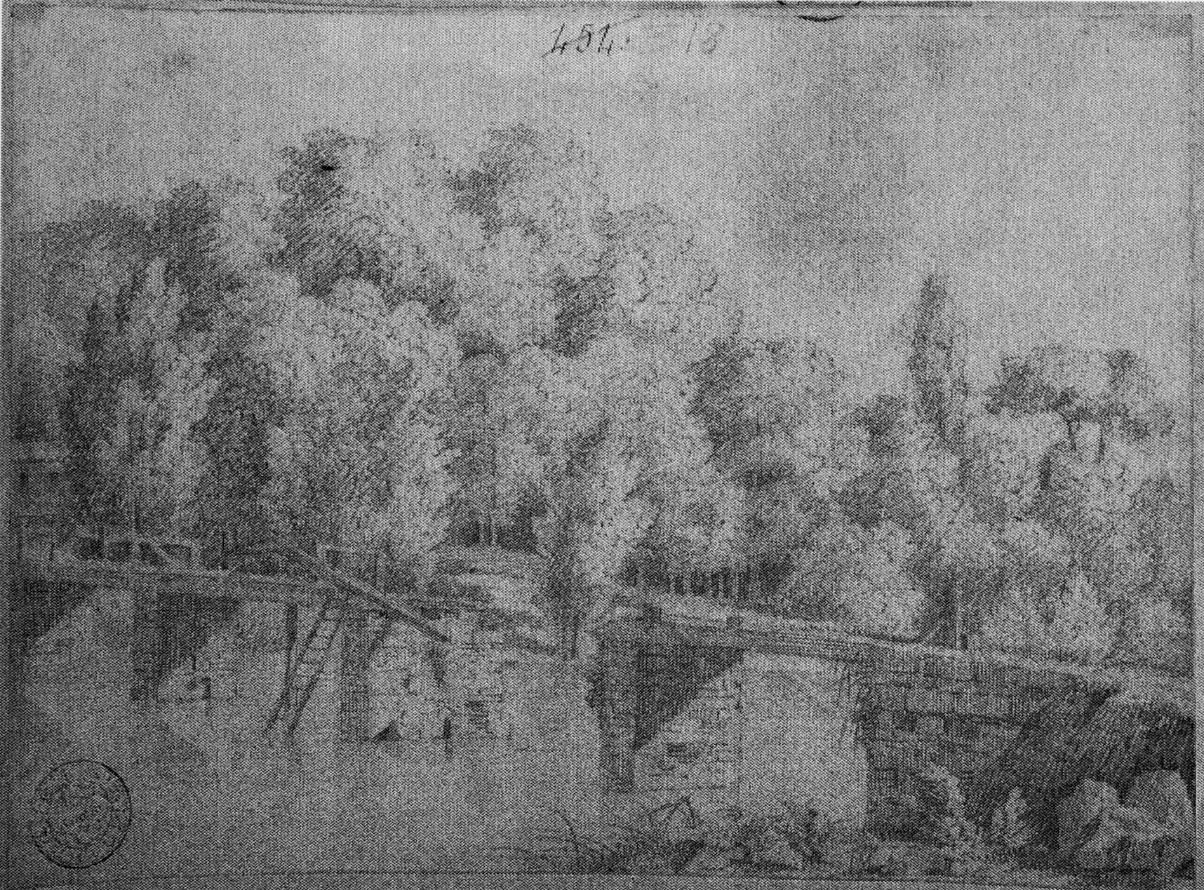 au clos-mortier, quartier Marnaval (?) prédécesseur du viaduc de Marnaval (?) sur un dessin de Pernot.